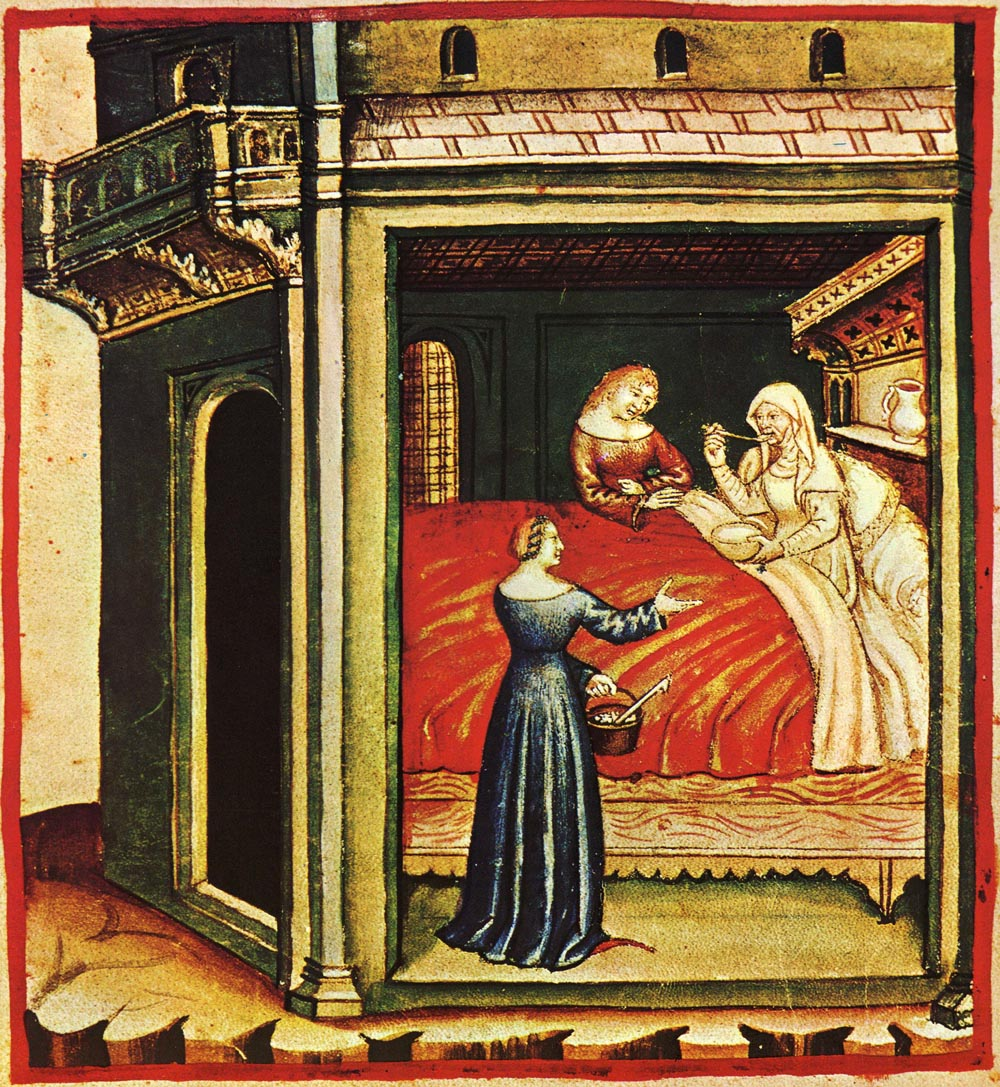 Tacuina sanitatis (XIV century) -impiego prodotti vegetali, Taccuino Sanitatis, Casanatense